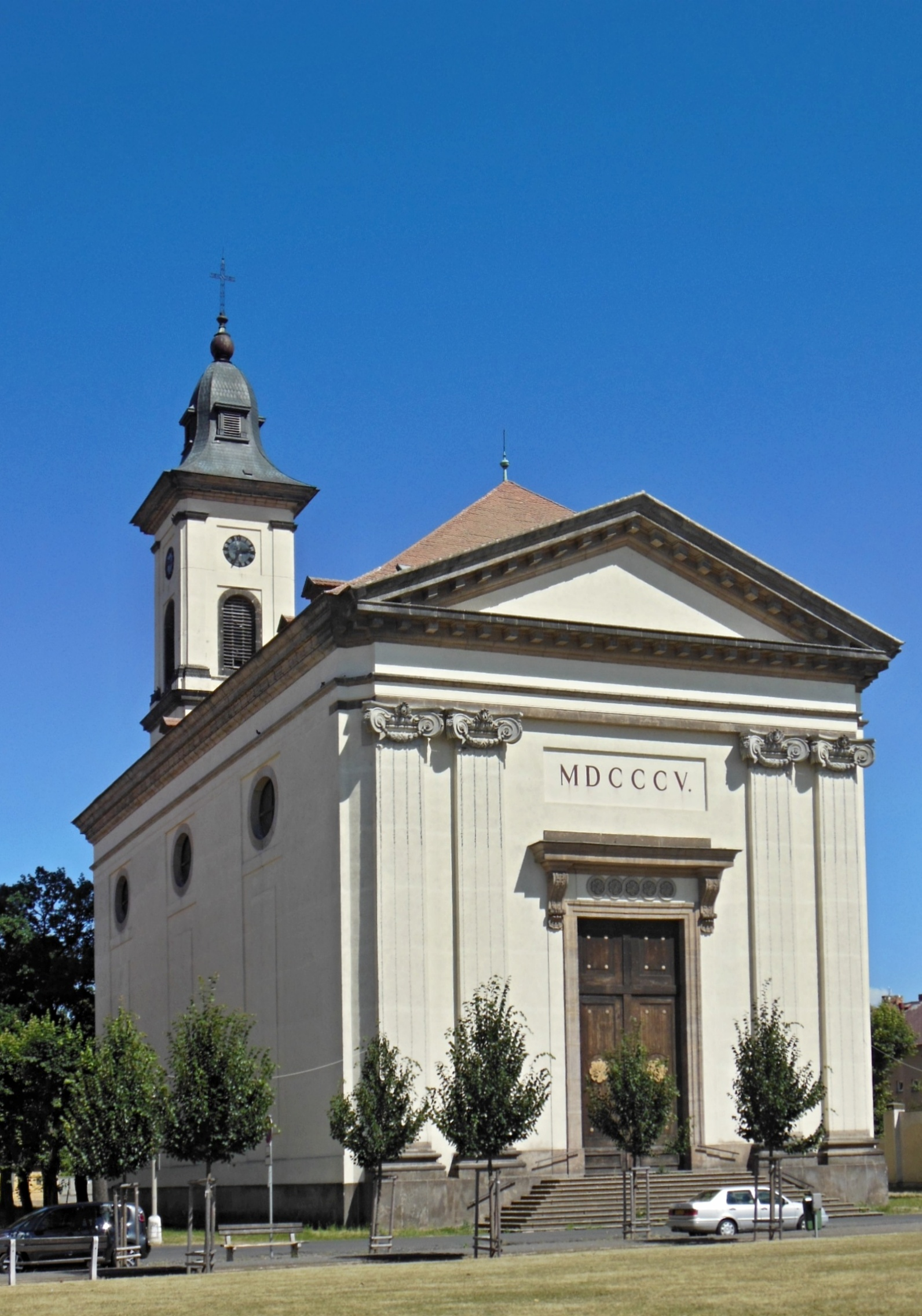 Kostel Vzkříšení Páně na náměstí Československé armády (ČSA) v Terezíně (okres Litoměřice).